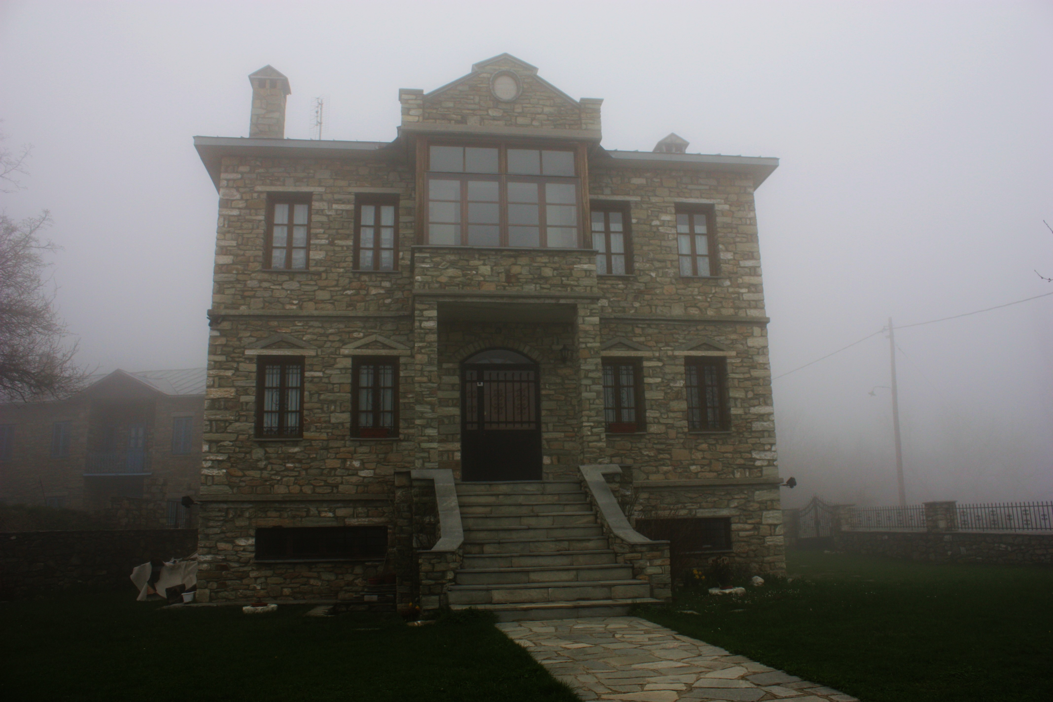 Νυμφαίο Φλώρινας«Νυμφαίο Φλώρινας»